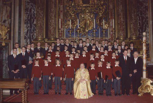 Chorknaben, Konzertfahrt nach Rom